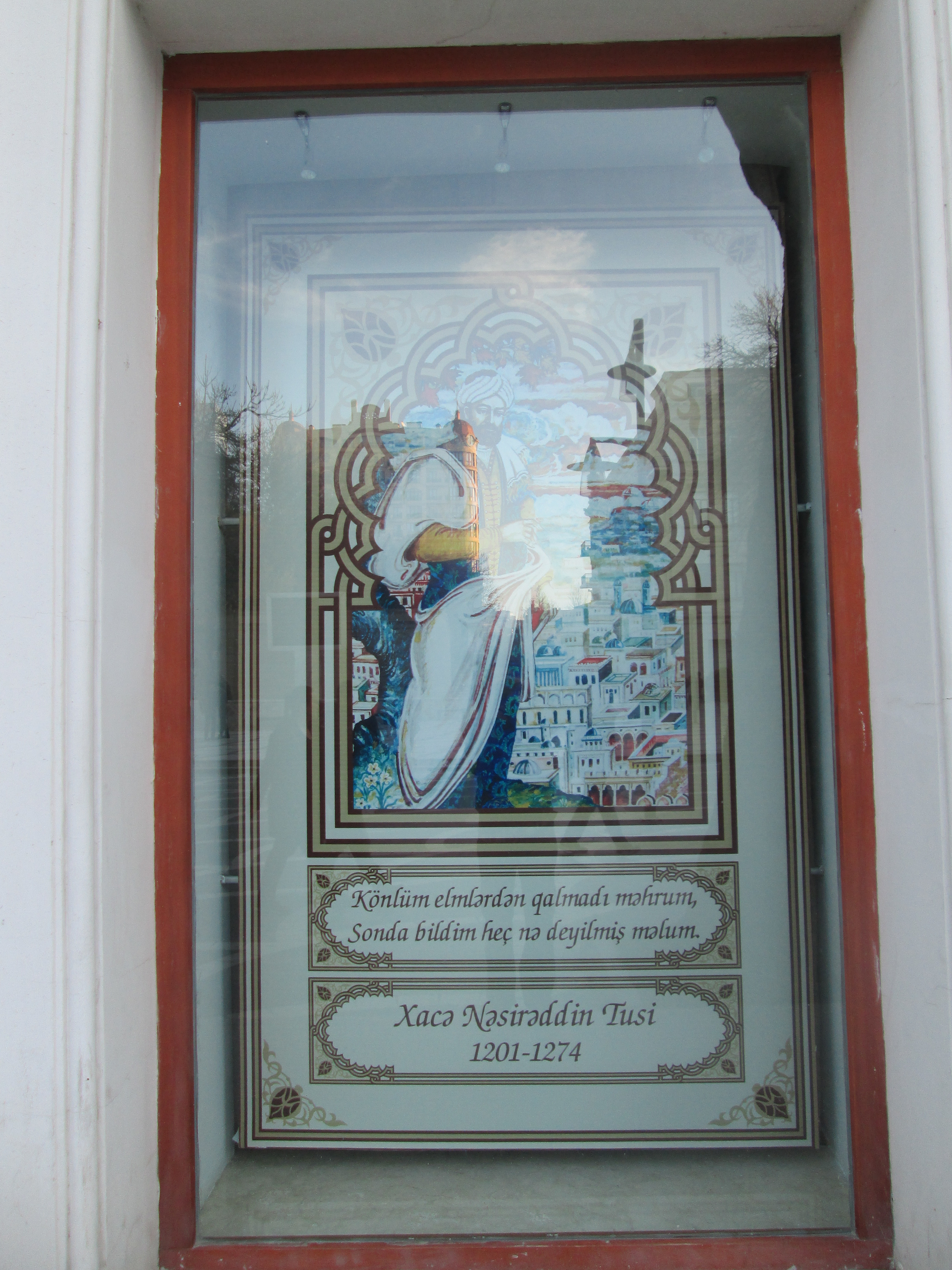 Nizami adına Ədəbiyyat Muzeyinin binasının pəncərəsində Xacə Nəsirəddin Tusi rəsmi